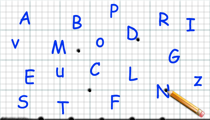 Scelta della lettera iniziale